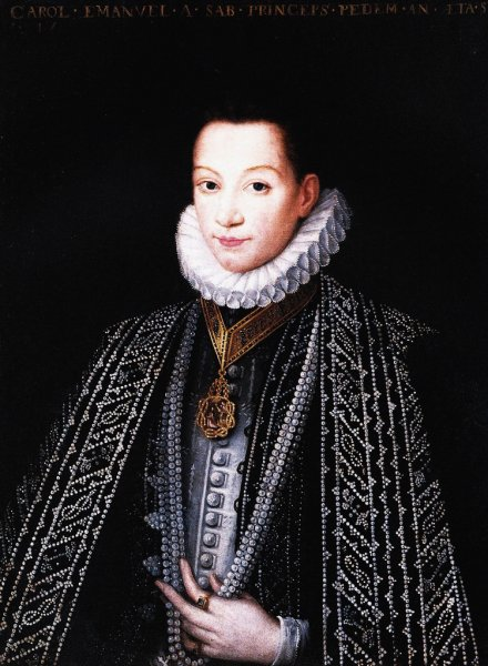 Ritratto del principe Carlo Emanuele I (1562-1630)